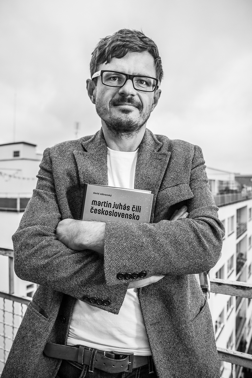 David Zábranský